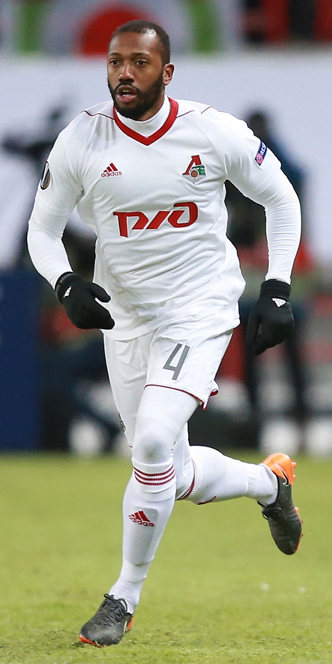 «Локомотив» положил на лопатки «Ниццу» в Москве